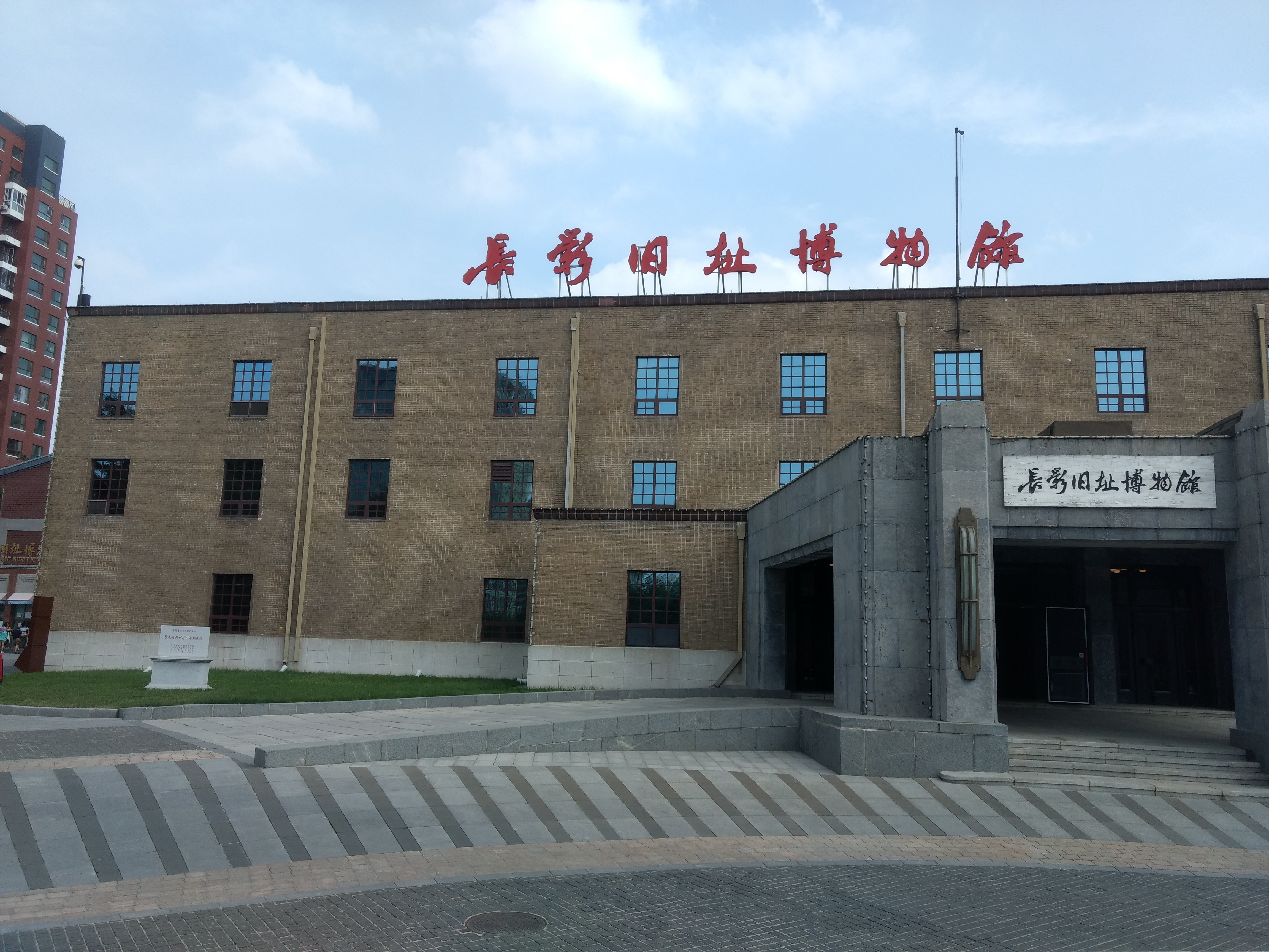 Entrada a l'antic estudi de cinema de Changchun.